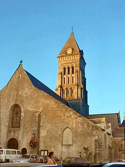 Kirche Saint Philbert en Noirmoutier (Noirmoutier 1998).